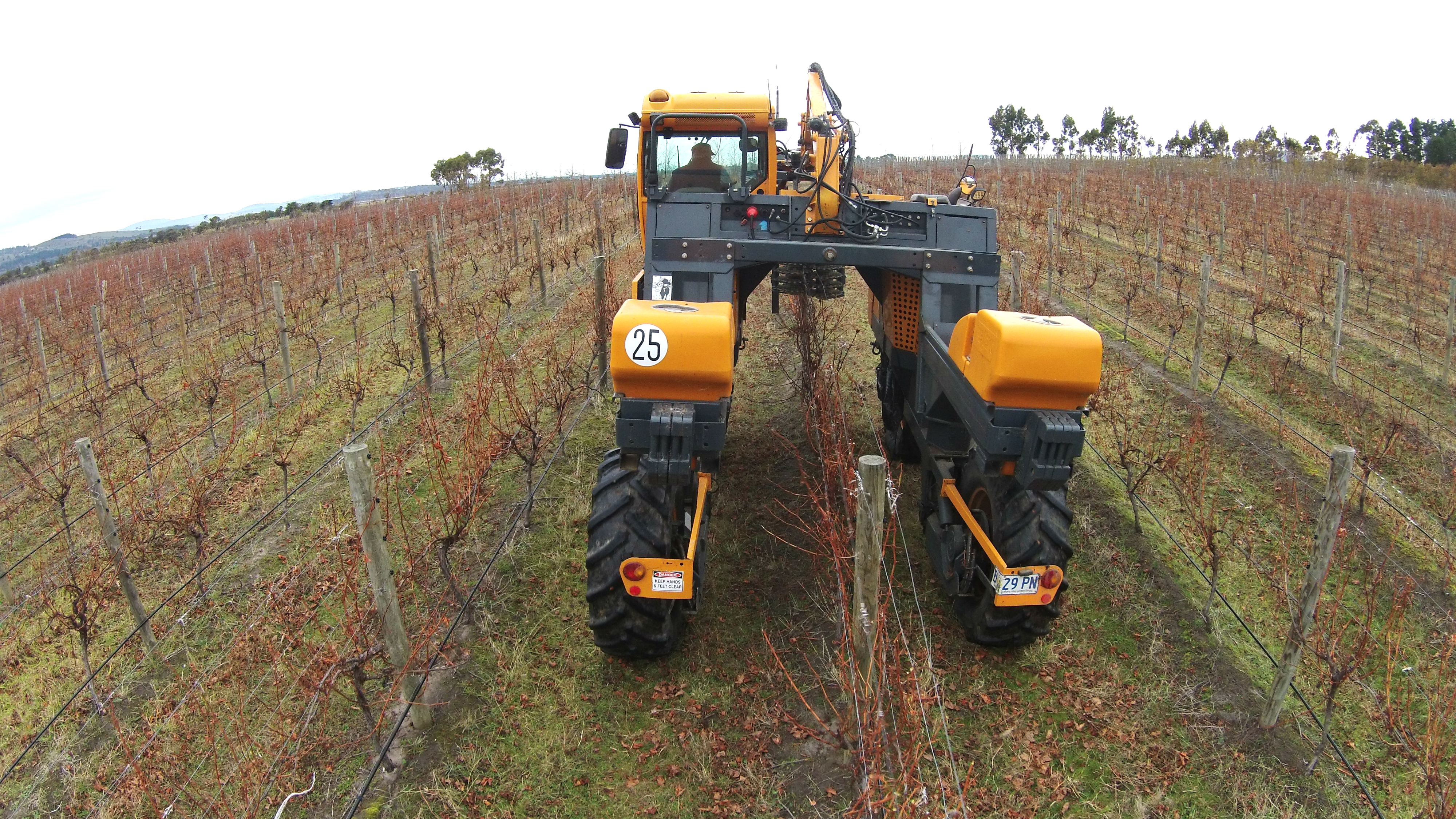 Prétaillage de la vigne. Riversdale Estate Vineyard - Pellenc 4680 Multi-function 'over-the-vine' Tractor.